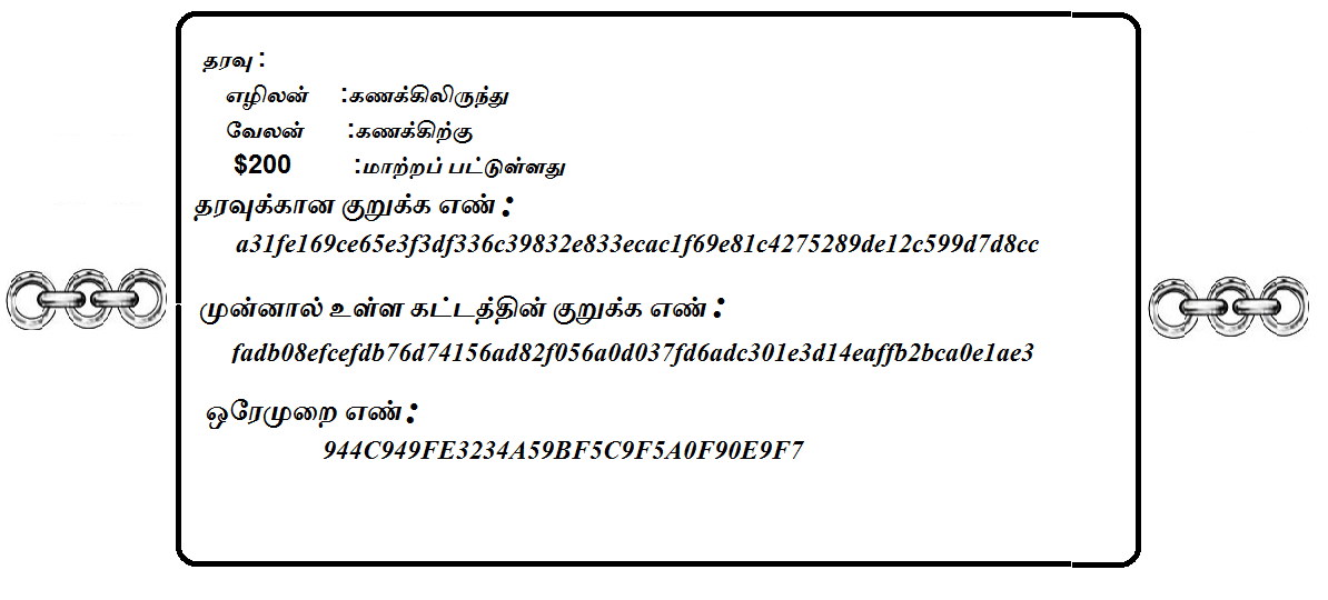 கட்டச்சங்கிலியில் கட்டம்